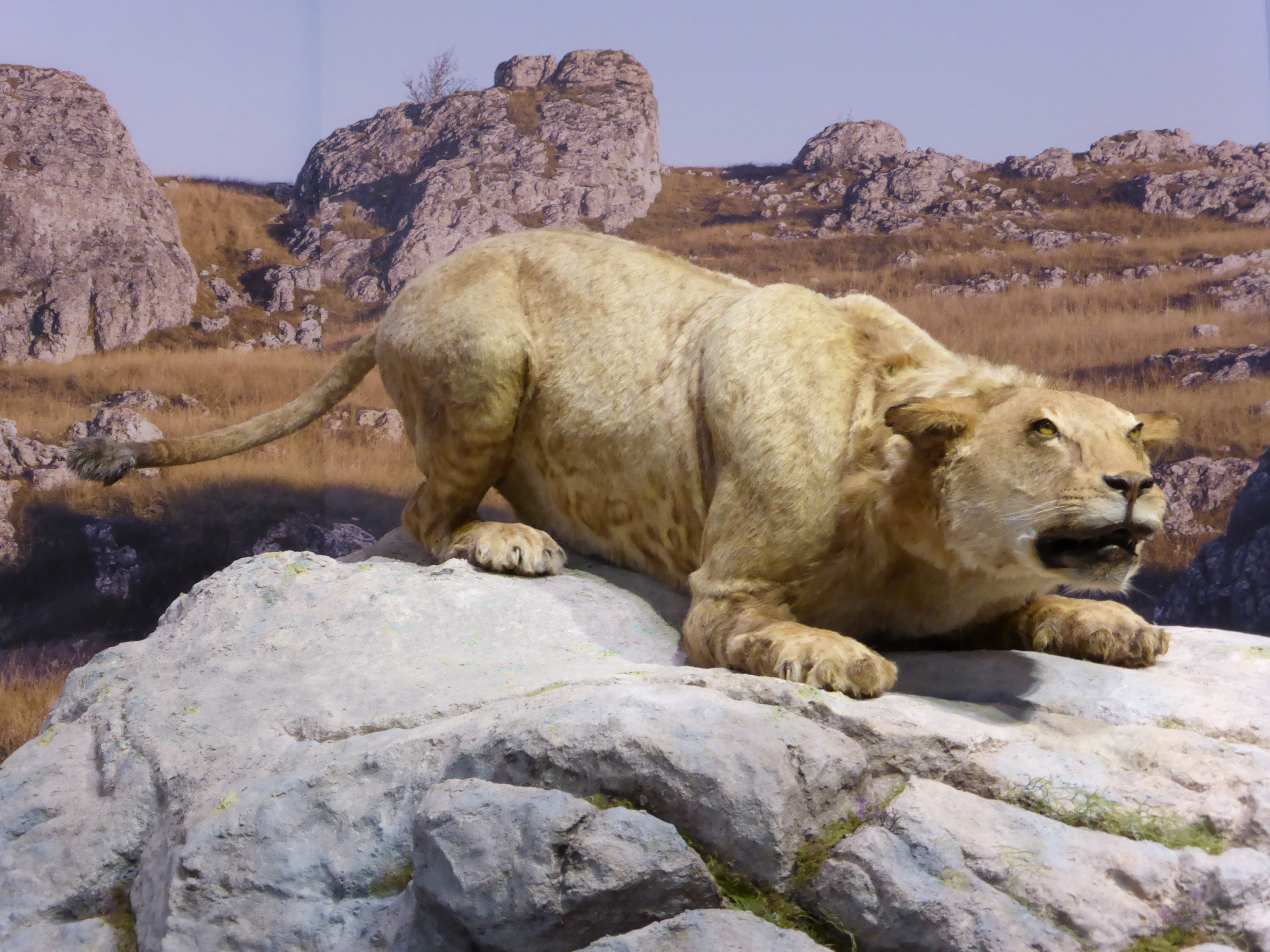 Reconstitution d'un lion des cavernes européen, Galerie de l'Aurignacien, Caverne du Pont d'Arc, France.